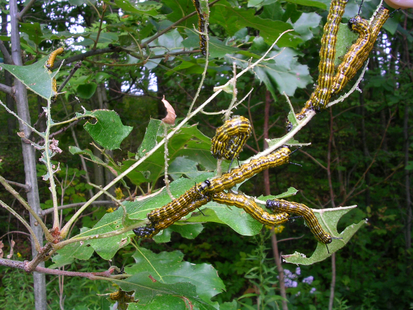 Anisota senatoria larval group